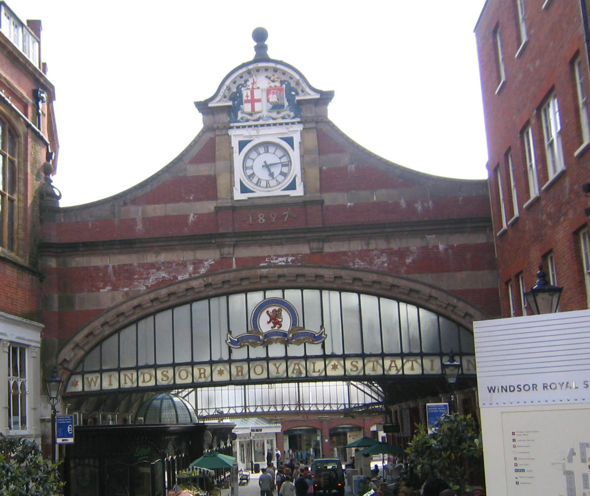 Haupteingang zum Bahnhof Windsor